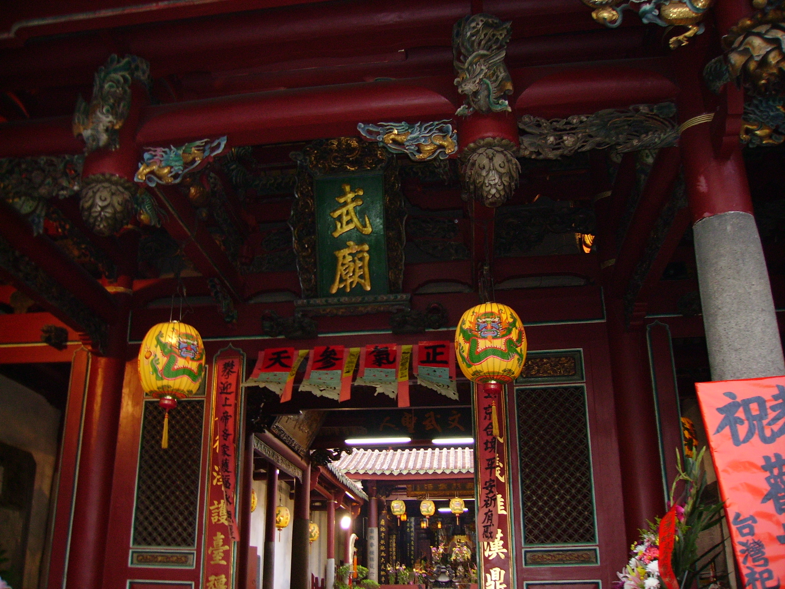 TEMPLE IN TAIWAN TAINAN KAWN